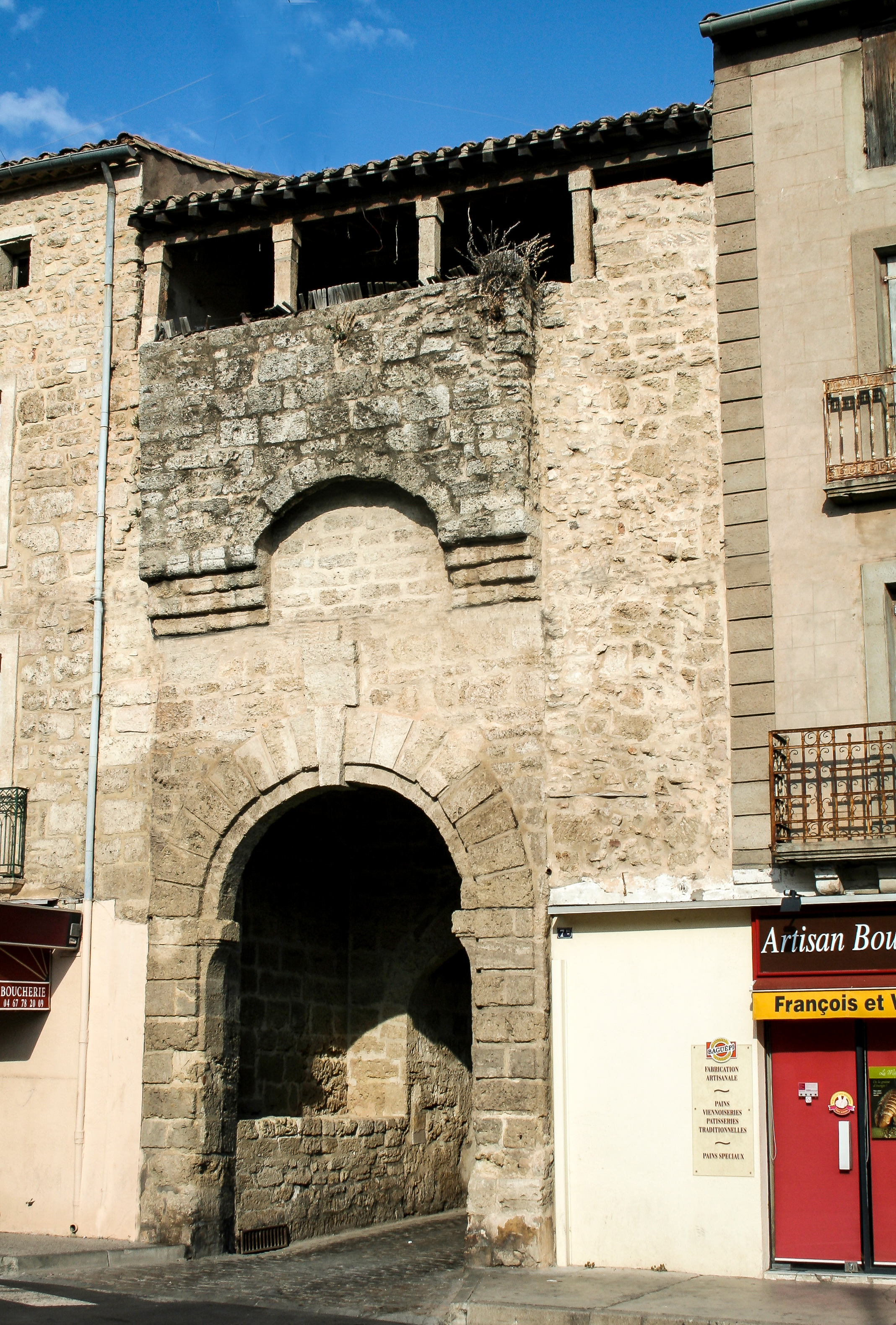 Poussan (Hérault) - porte Notre-Dame.